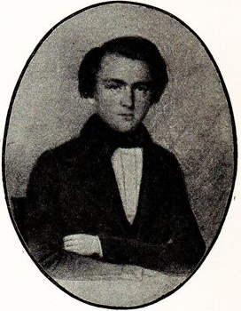 Sortkrittegning fra 1842 av forfatteren Hans Ørn Blom.